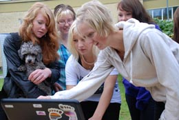 Skolfotografering. Hur blev det?!